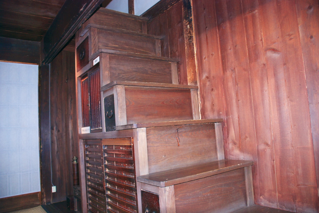 まぁ、昔のお家ってこんなものでしょう…。上り難いし、下り難い…。